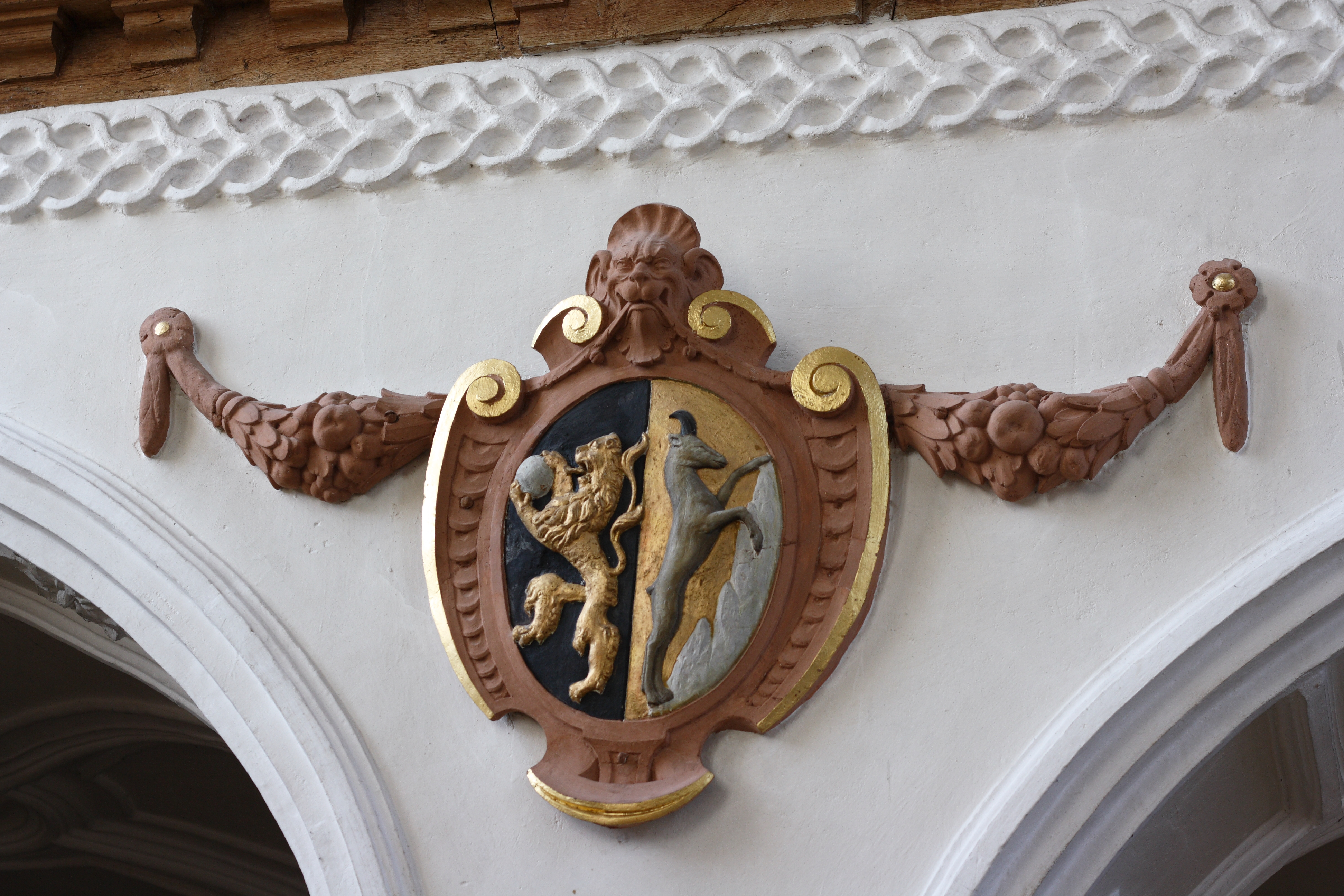 Evangelisch-lutherische Dreifaltigkeitskirche in Haunsheim, einer Gemeinde im Landkreis Dillingen an der Donau (Bayern), Wappen von Zacharias Geizkofler in einer Stuckkartusche an der Orgelempore